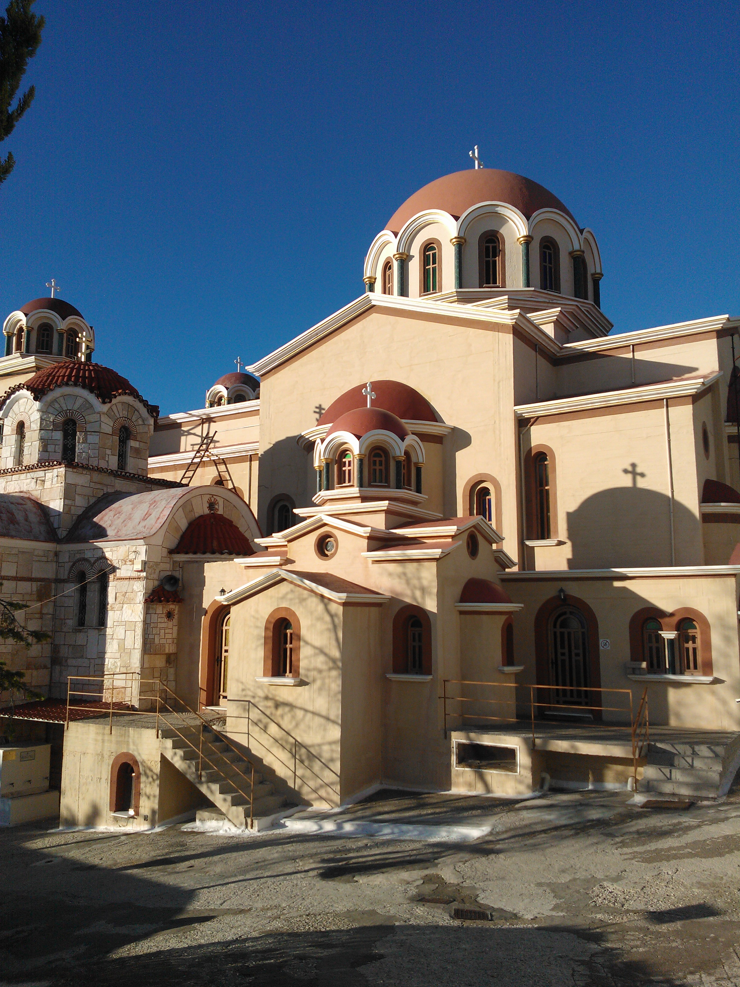 Собор свв. Киприана и Иустины в Фили, Аттика, Греция